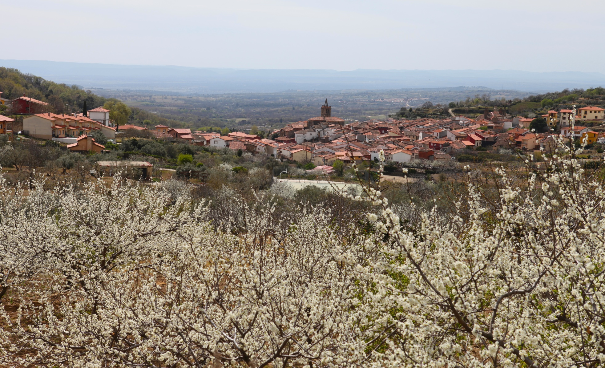 Vista general de Pasarón de La Vera.